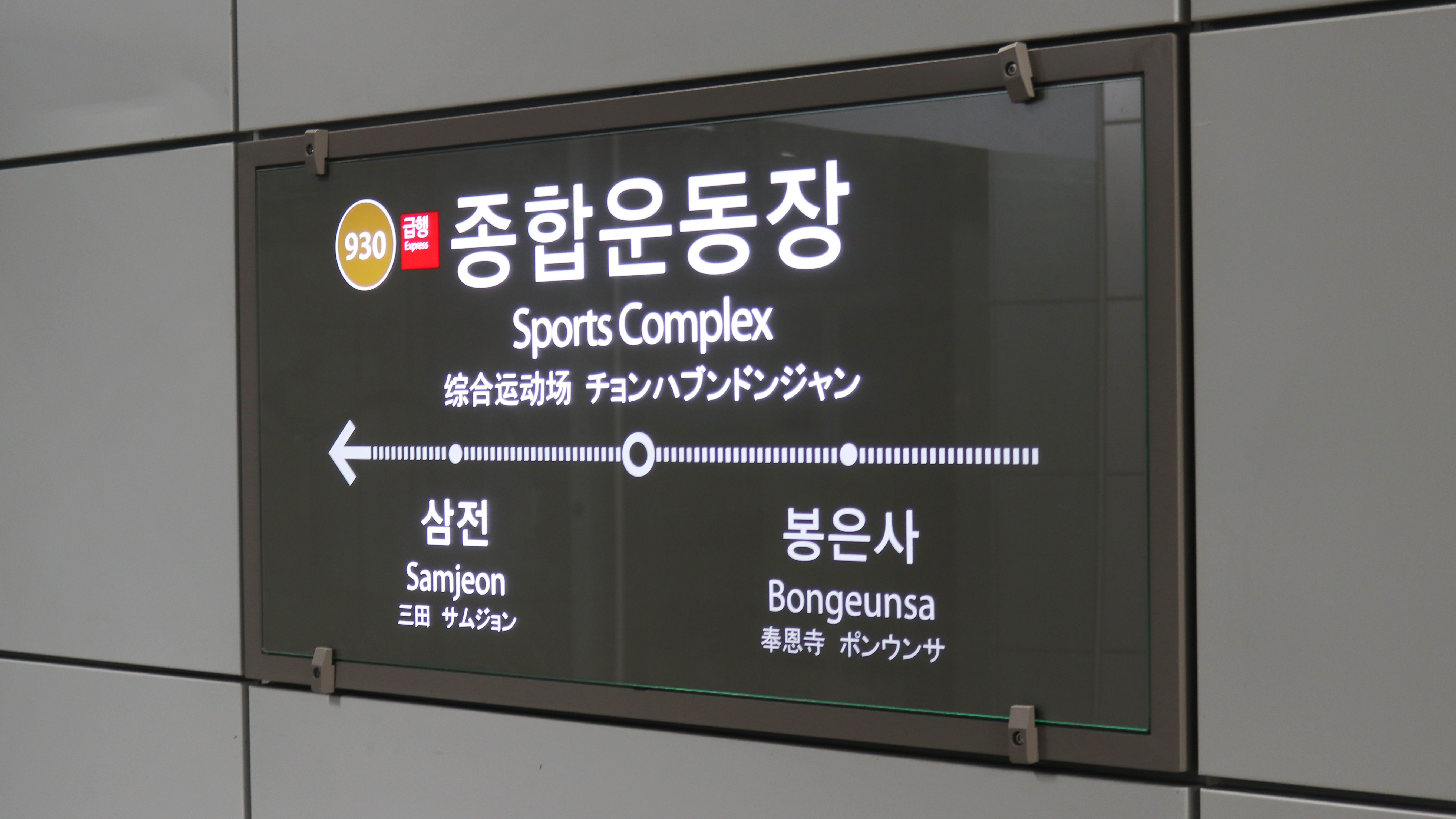 9호선 종합운동장역 역명판